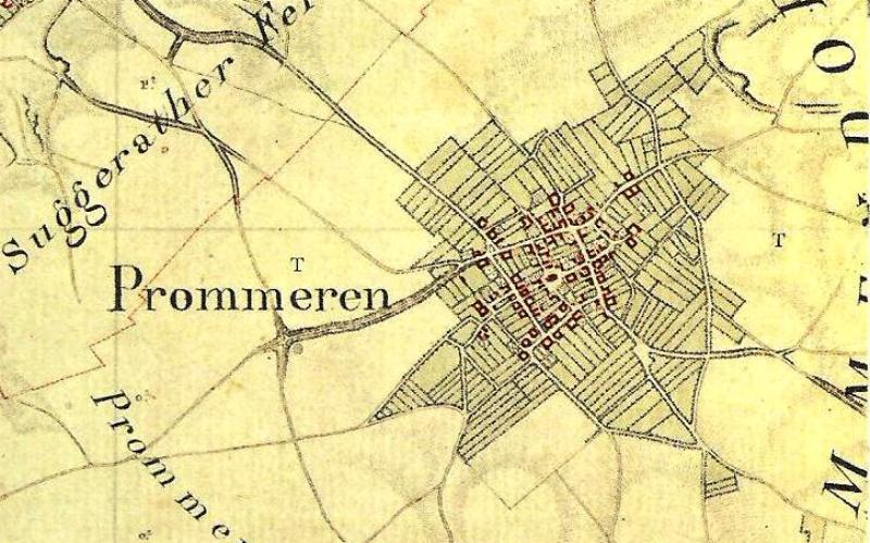 Kartenaufnahme der Rheinlande 1803-1820